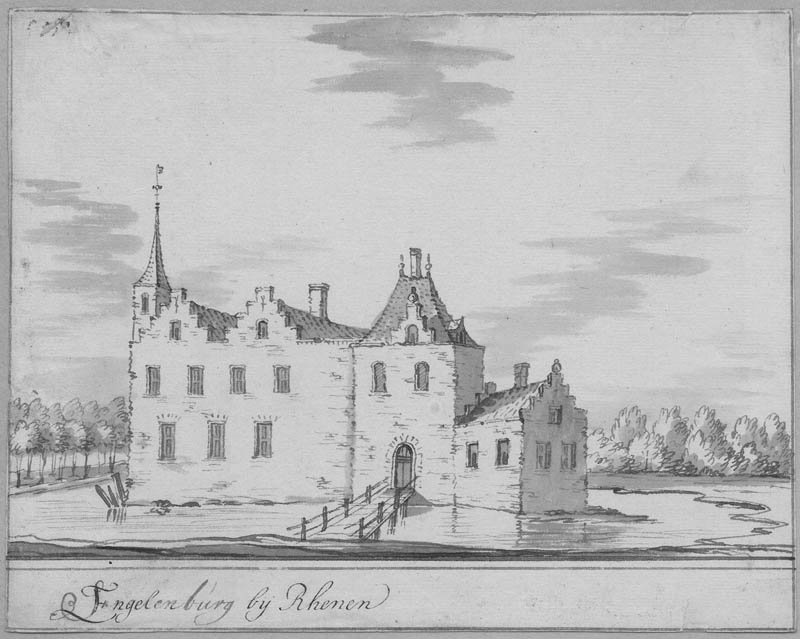 Kasteel Engelenburg bij Herwijnen (Gelderland)